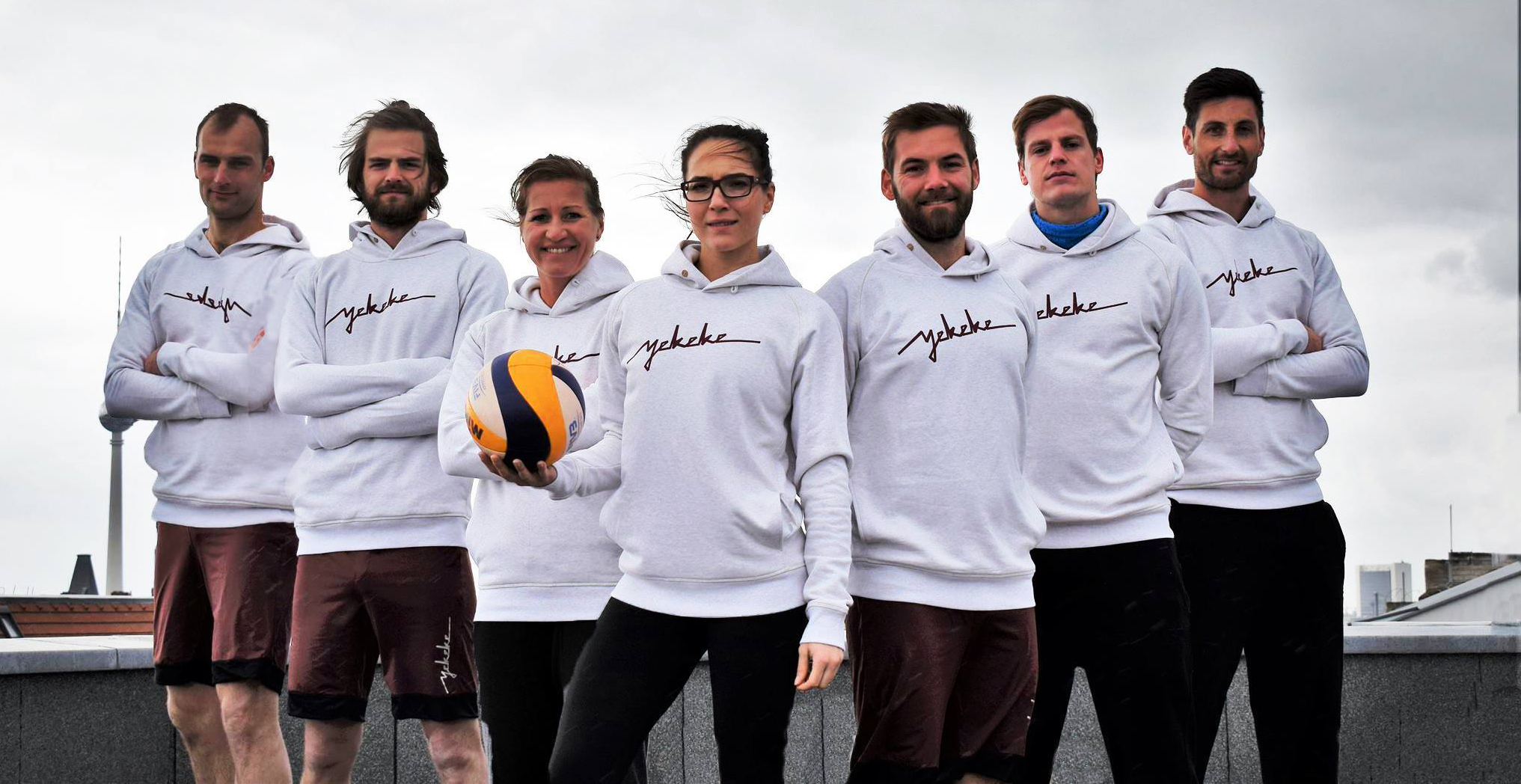 Lineup